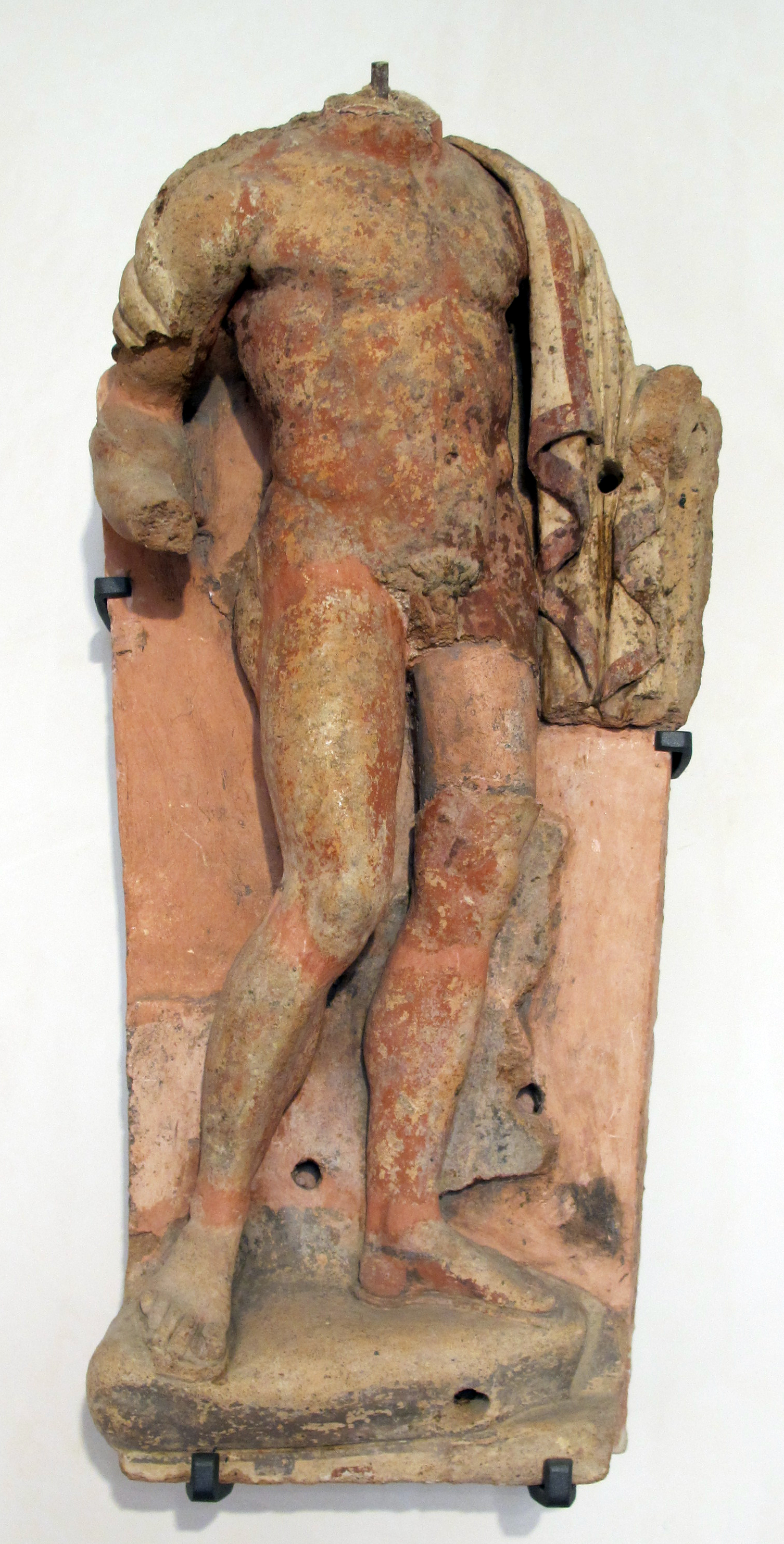 Museo Claudio Faina